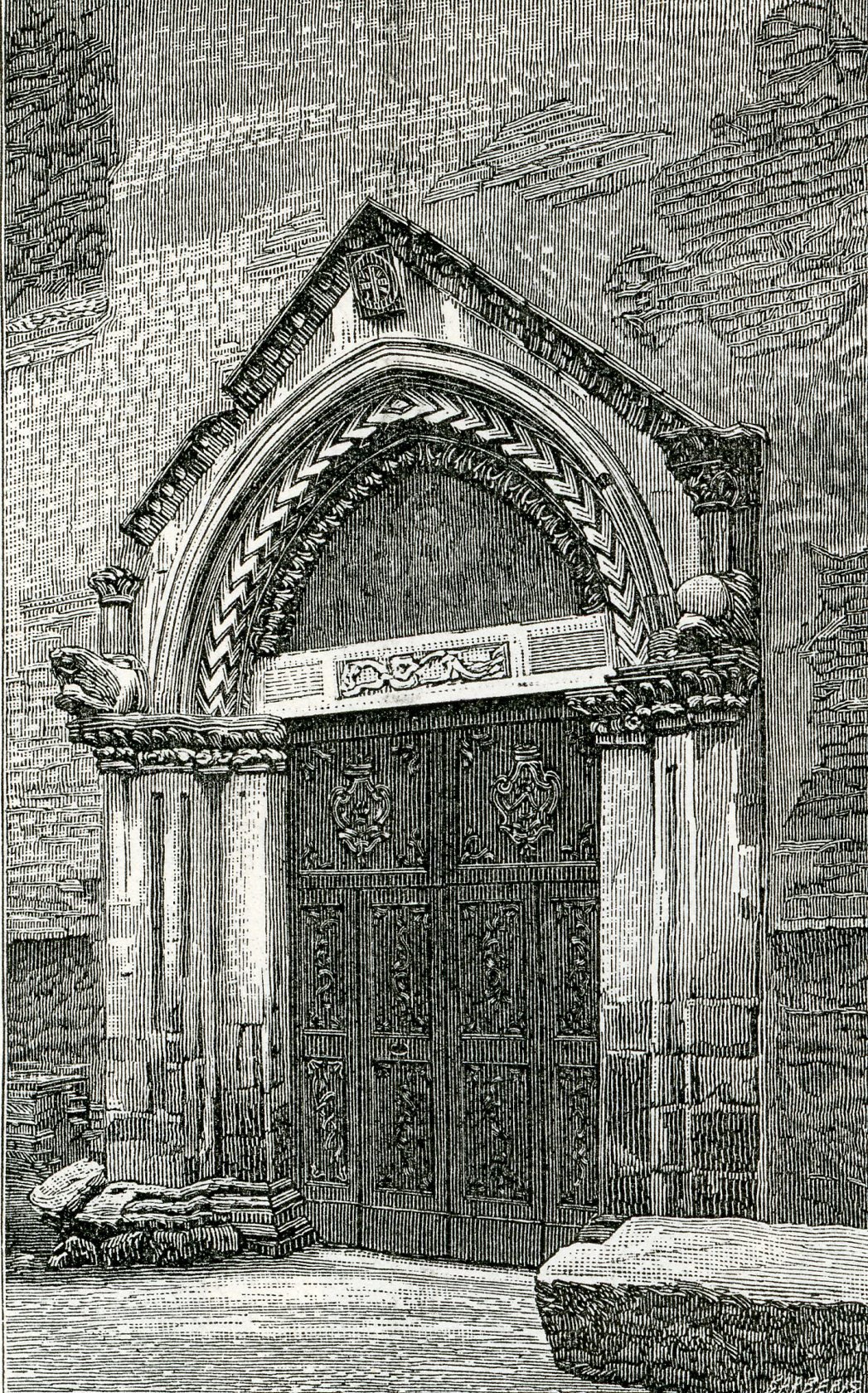 Chieti: porta della chiesa di S. Antonio Abate (xilografia di Barberis 1898).